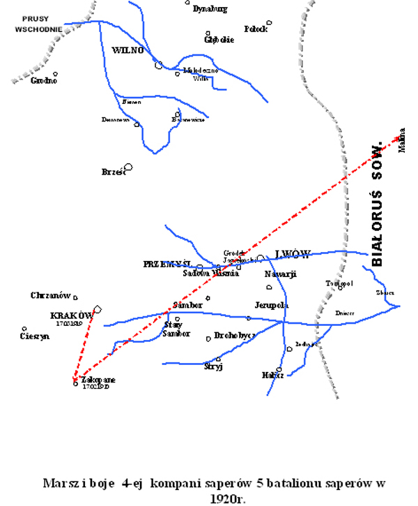 Boje i marsze 4 ksap z 5 Pułku Saperów w 1920r.